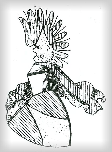 Wappen der Herren von Goldegg nach Siebmachers Wappenbuch